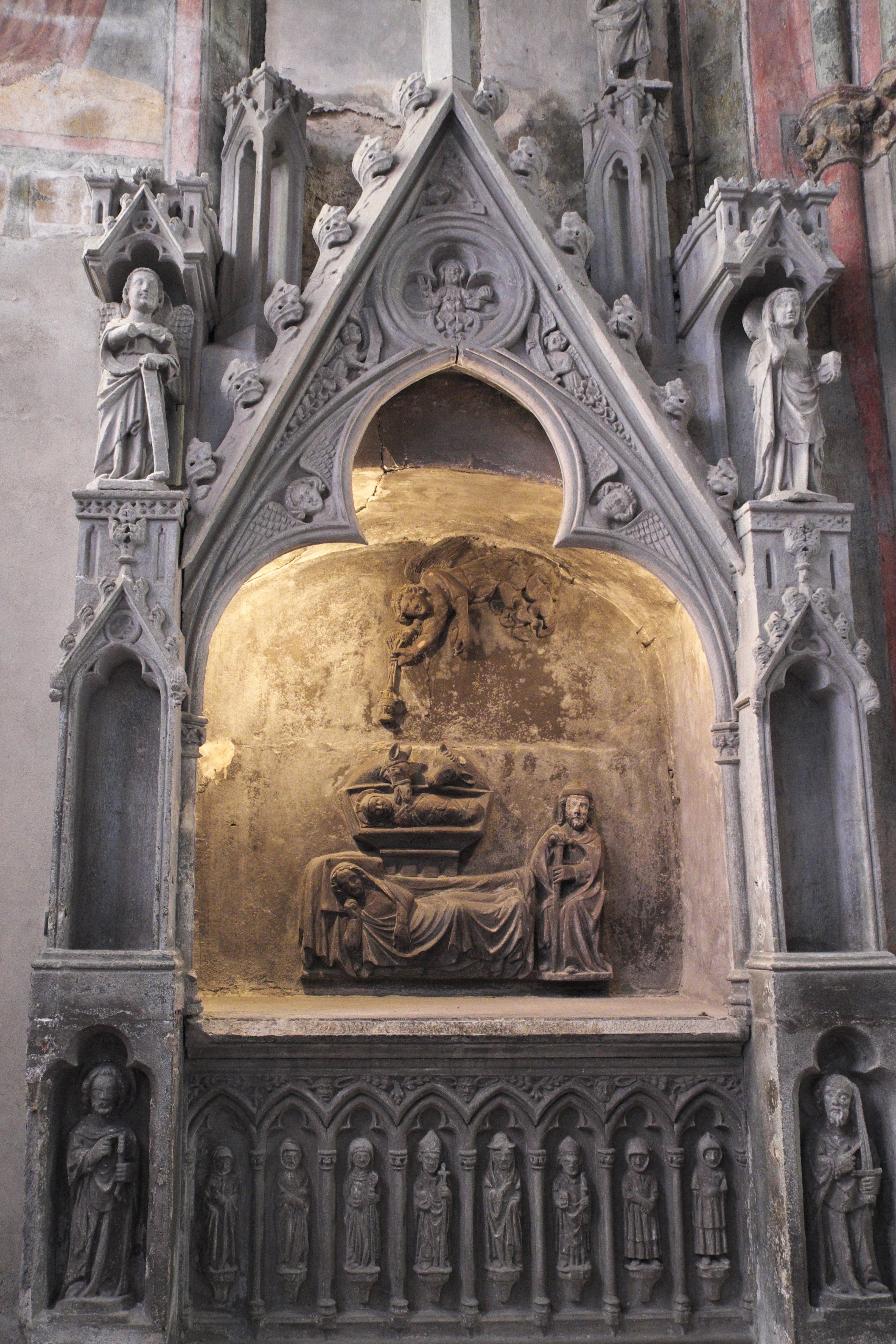 Katholische Pfarrkirche, ehemalige Stiftskirche, Saint-Cerneuf in Billom im Département Puy-de-Dôme (Auvergne-Rhône-Alpes), Grabmal von Gilles I. Aycelin de Montaigut aus dem 14. Jahrhundert in der Chapelle du Rosaire (Rosenkranzkapelle)